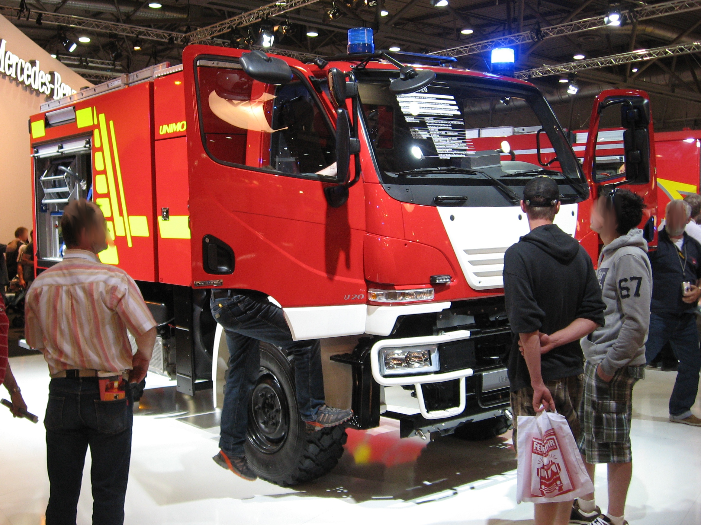 TLF 10/20 auf Unimog, vorgestellt auf der Interschutz 2010